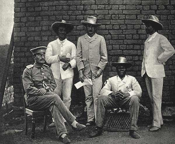 V.l.n.r.: Theodor Leutwein (ganz links), Herero-Führer aus Otjimbingwe: Zacharias Zeraua (2.v.l.), Dolmetscher Kleinschmidt (Mitte), Herero-Führer aus Omaruru: Manasse Tyiseseta (4.v.l.) und der oberste Herero-Führer Samuel Maharero (rechts) im Jahr 1895.